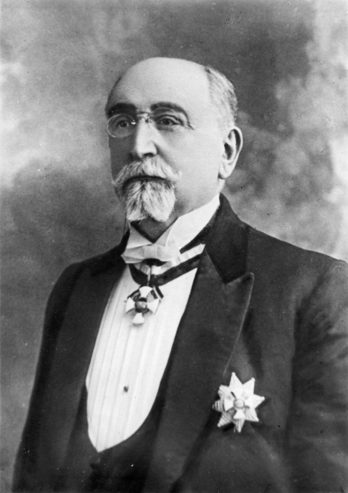 foto dello storico abruzzese Alfonso Colarossi-Mancini con le insegne di Cavaliere di Gran Croce del Regno d'Italia